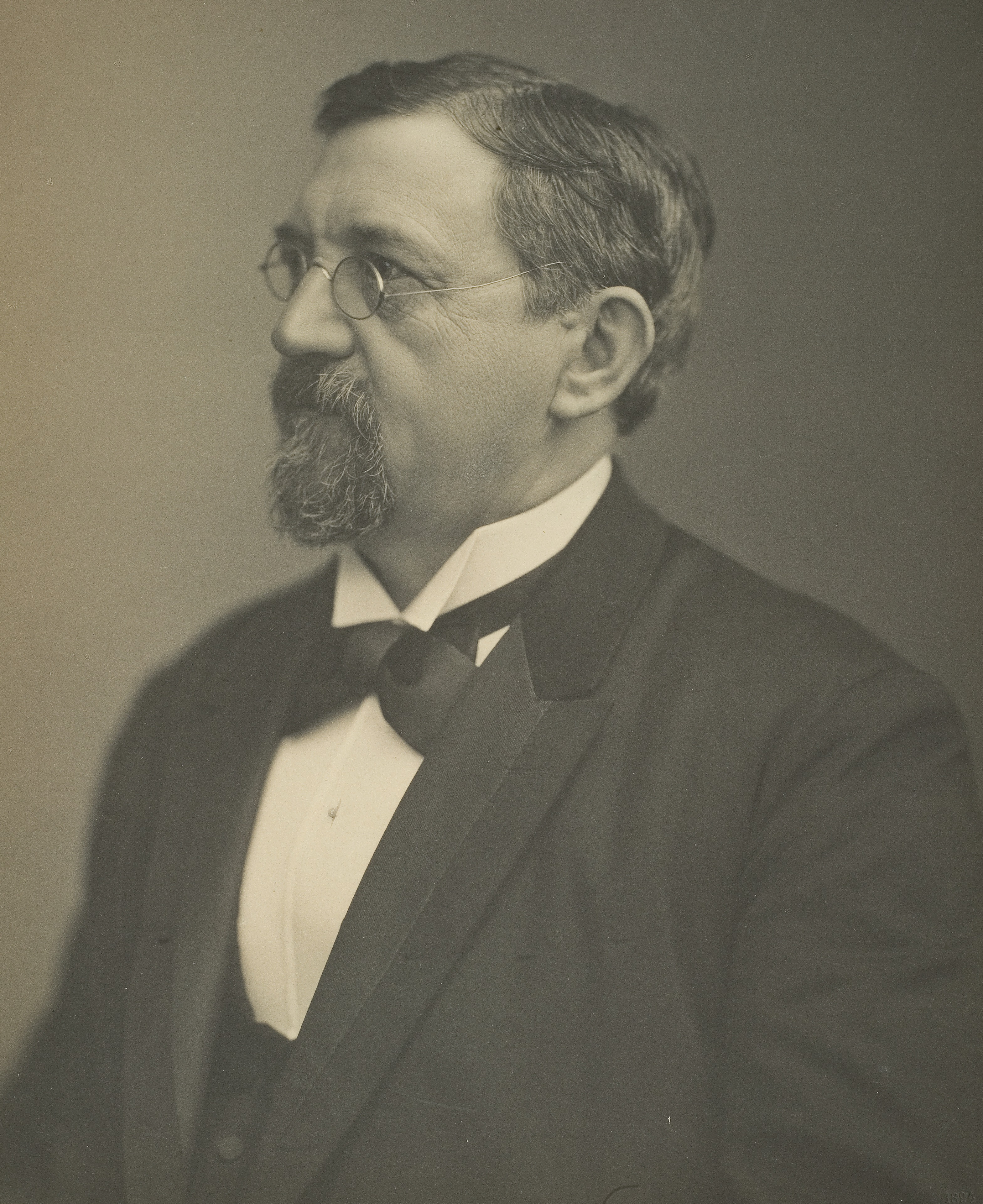 Karl Zangemeister, Altphilologe, 1872–1902 Professor in Heidelberg, Direktor der Universitätsbibliothek